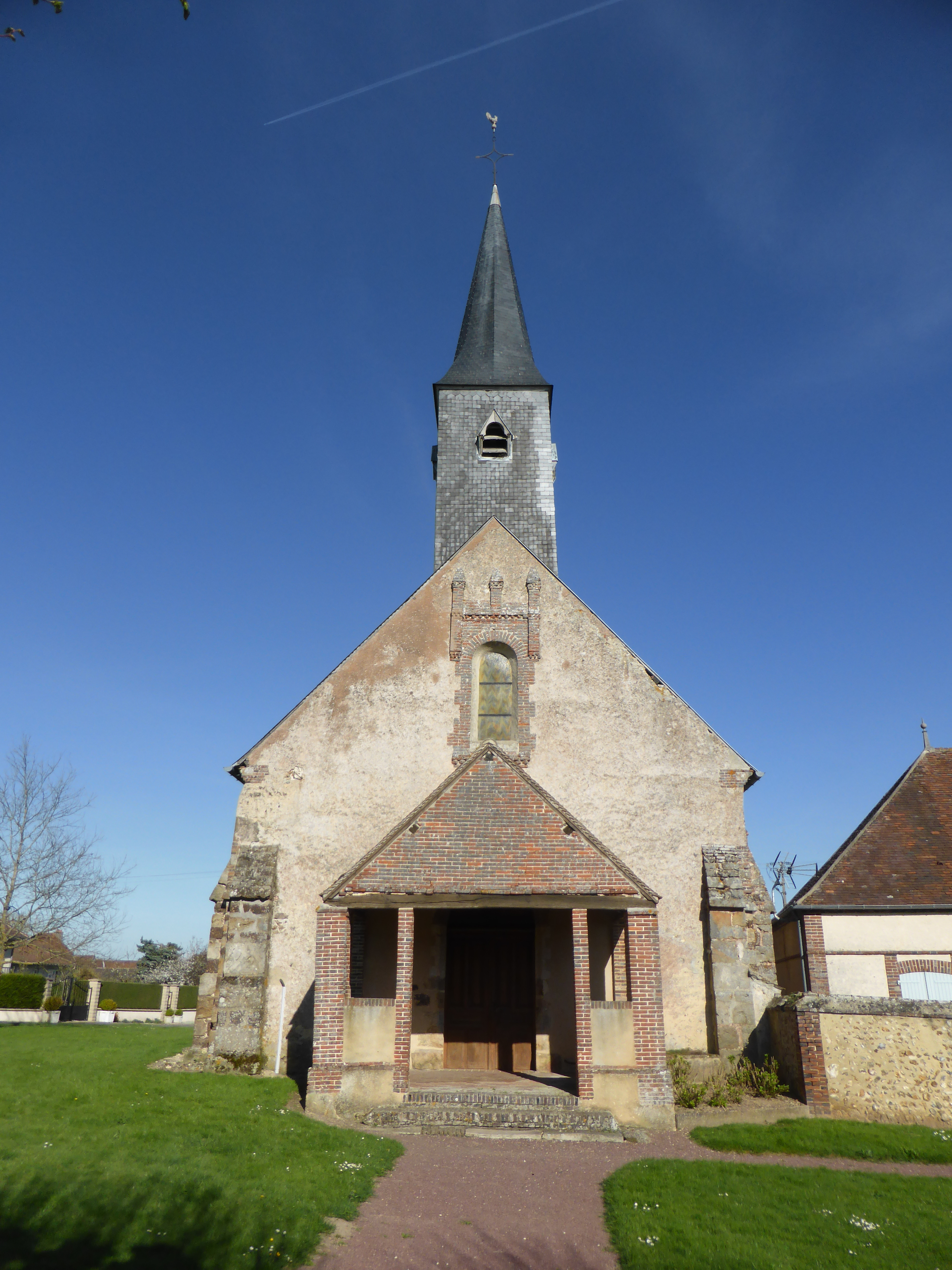 Façade et clocher de l'église Saint-Même de Saint-Maixme-Hauterive, en Eure-et-Loir.